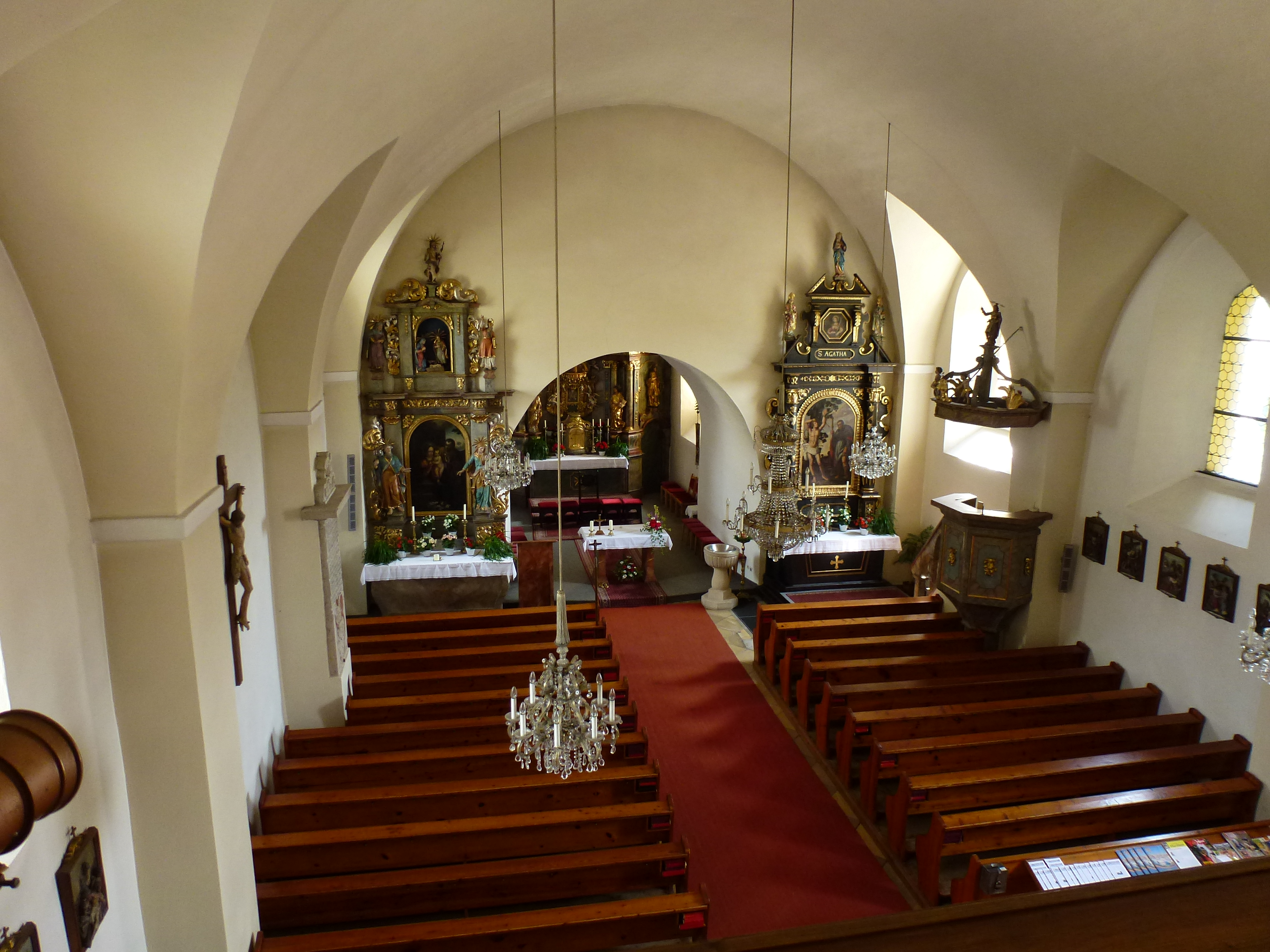 Pfarrkirche, Innenraum von der Empore